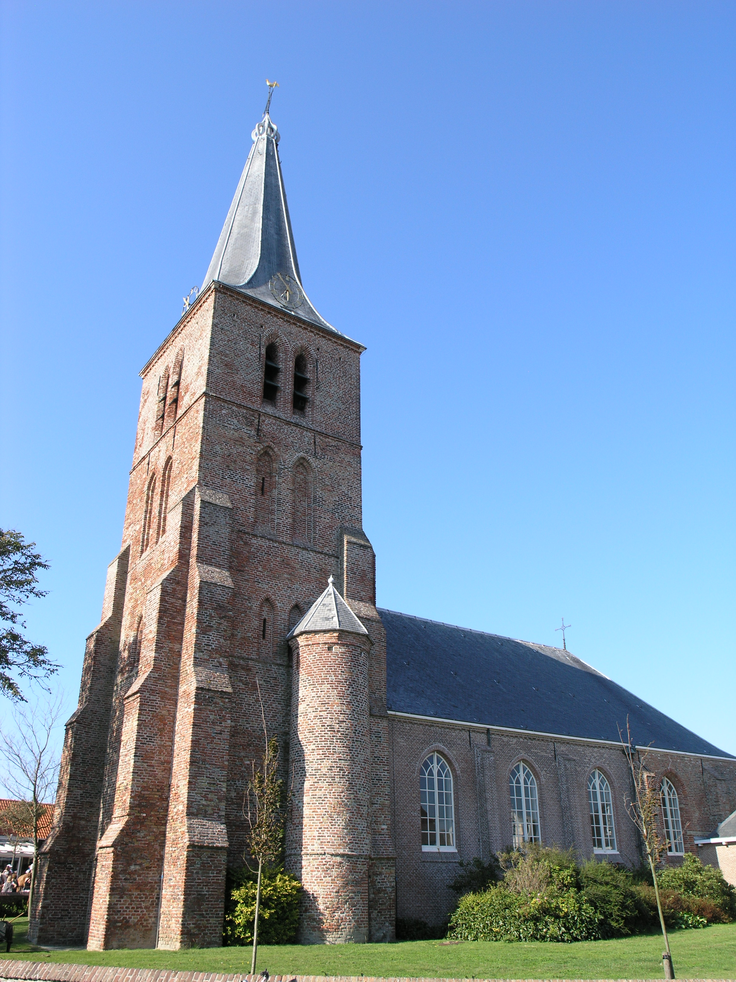 Domburg Kerk IV